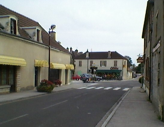 Une des rues de Gergy avec quelques commerces